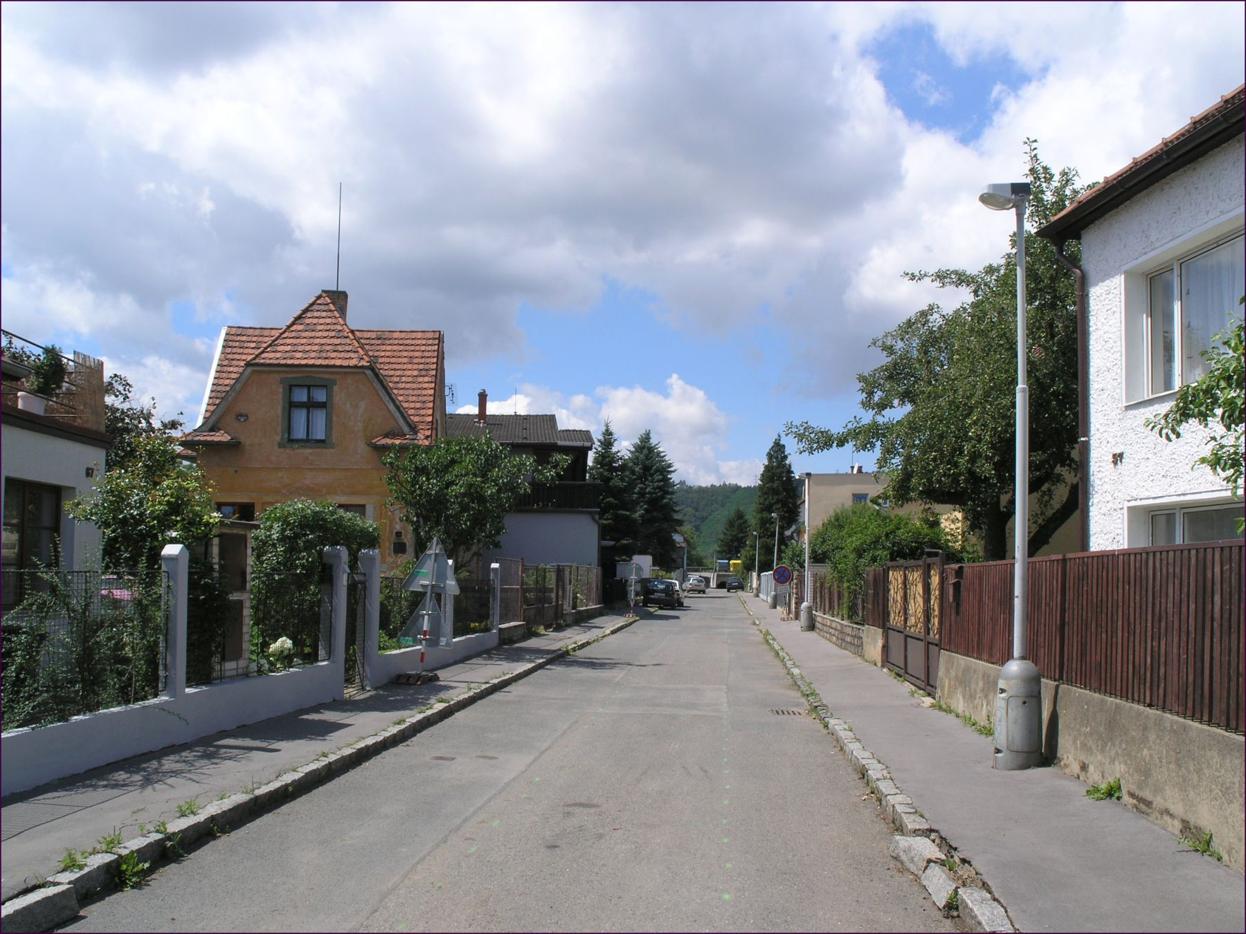 Praha, Lahovičky - ulice Ke Stanici